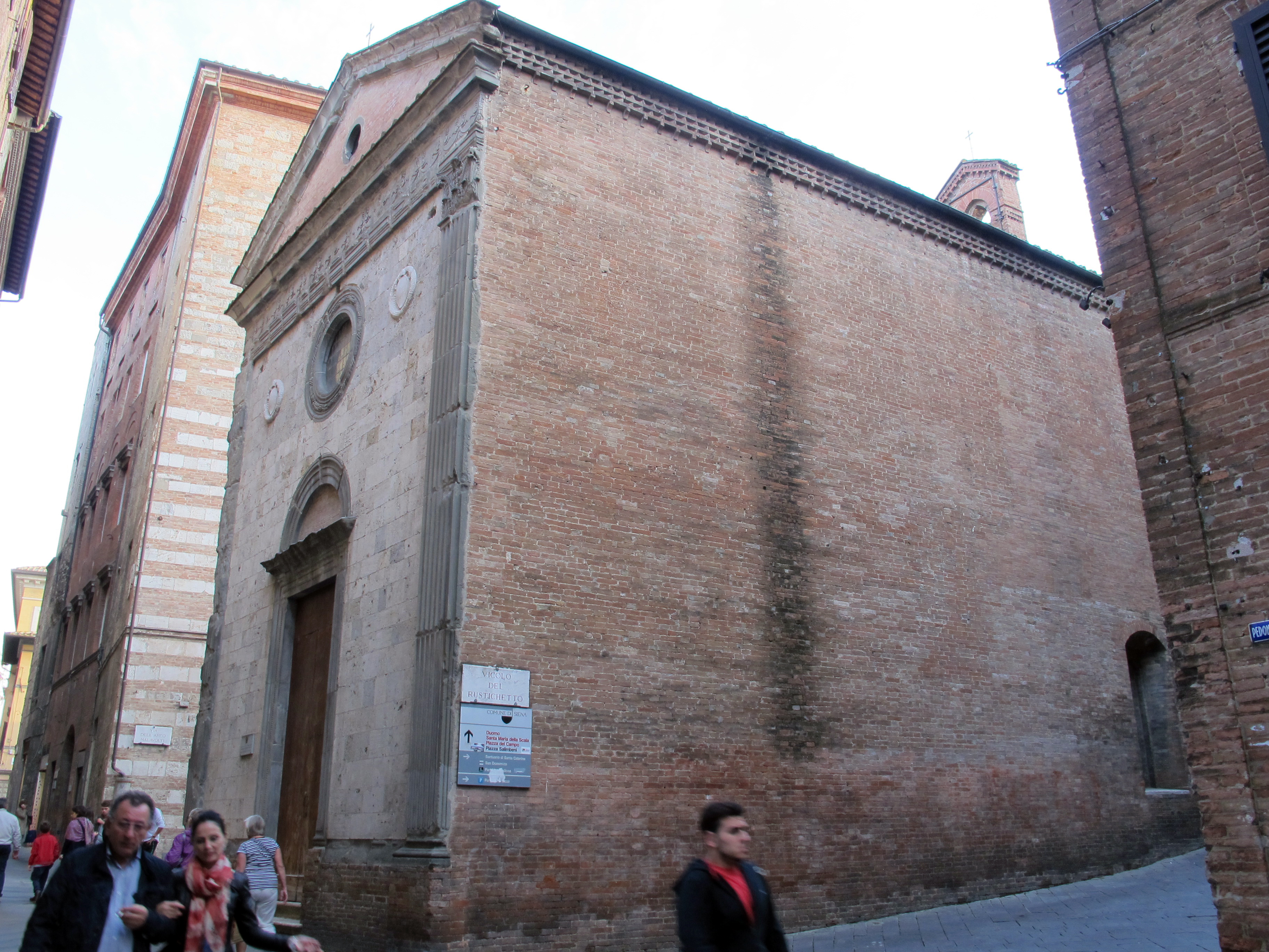 Siena